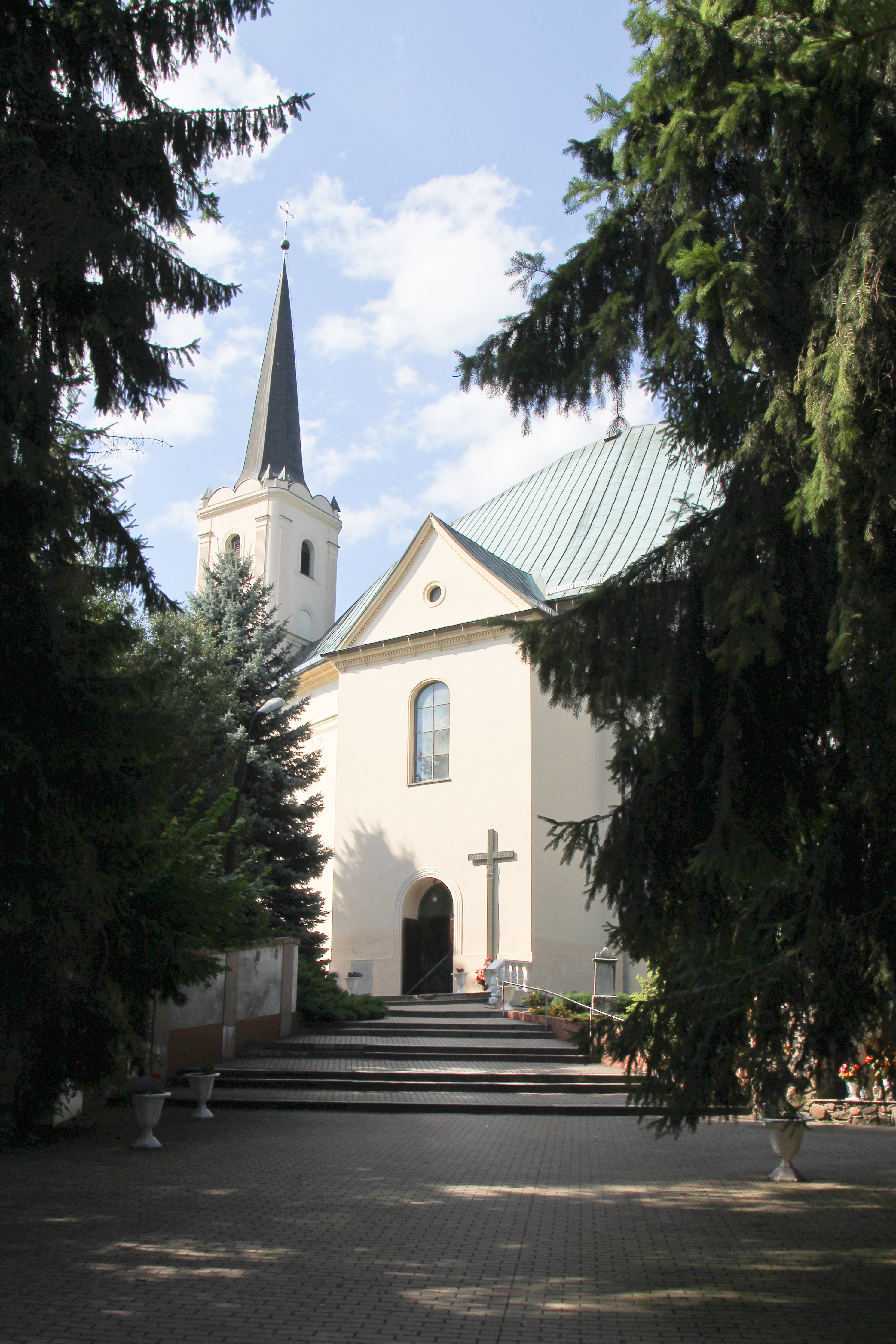 Rudziczka - rzymskokatolicki kościół parafialny p.w. Św. Trójcy, 1801-1803